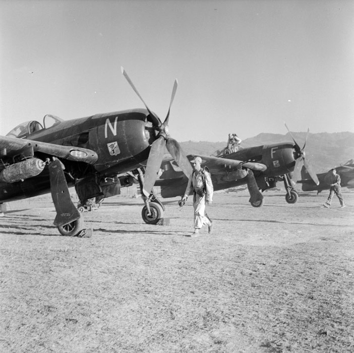 Các máy bay chiến đấu Bearcats F8F1 (Groupe de Chasse 1/8 Saintonge) từ sân bay Mường Thanh đi đánh phá đường 41